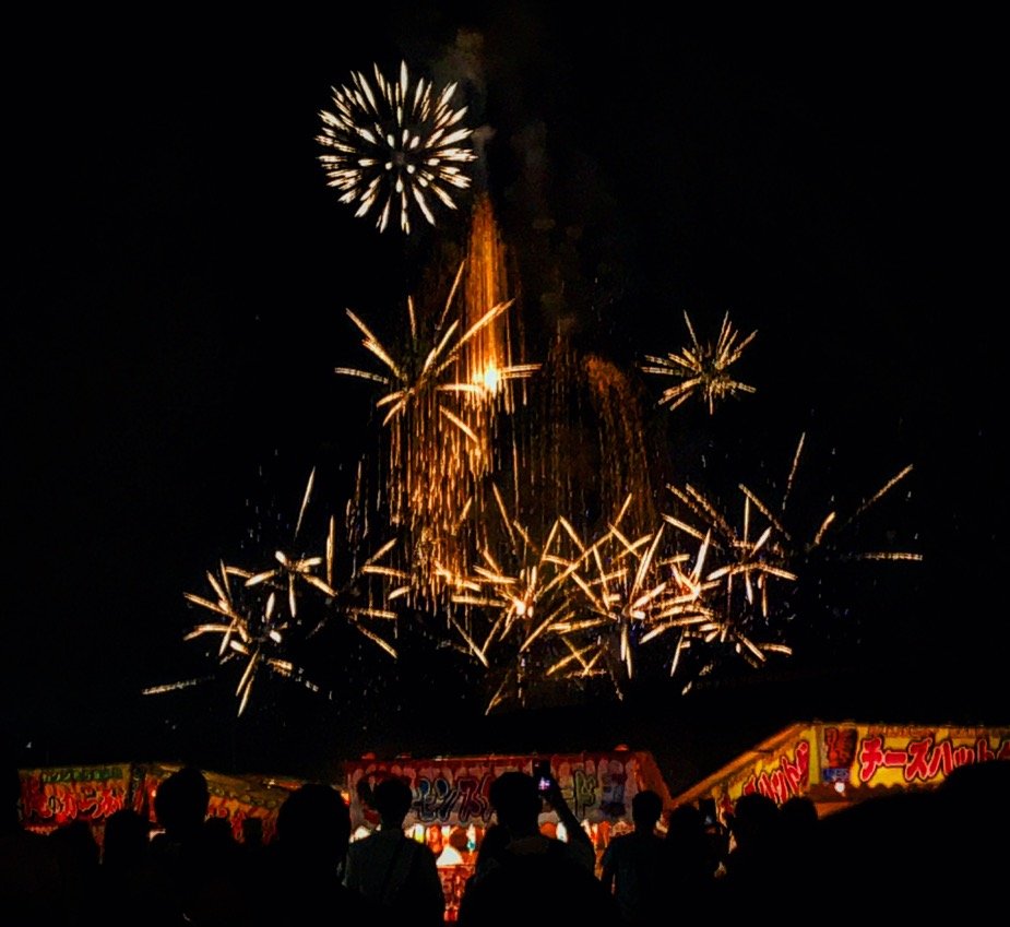 猪名川花火大会 投稿者撮影 大阪府池田市